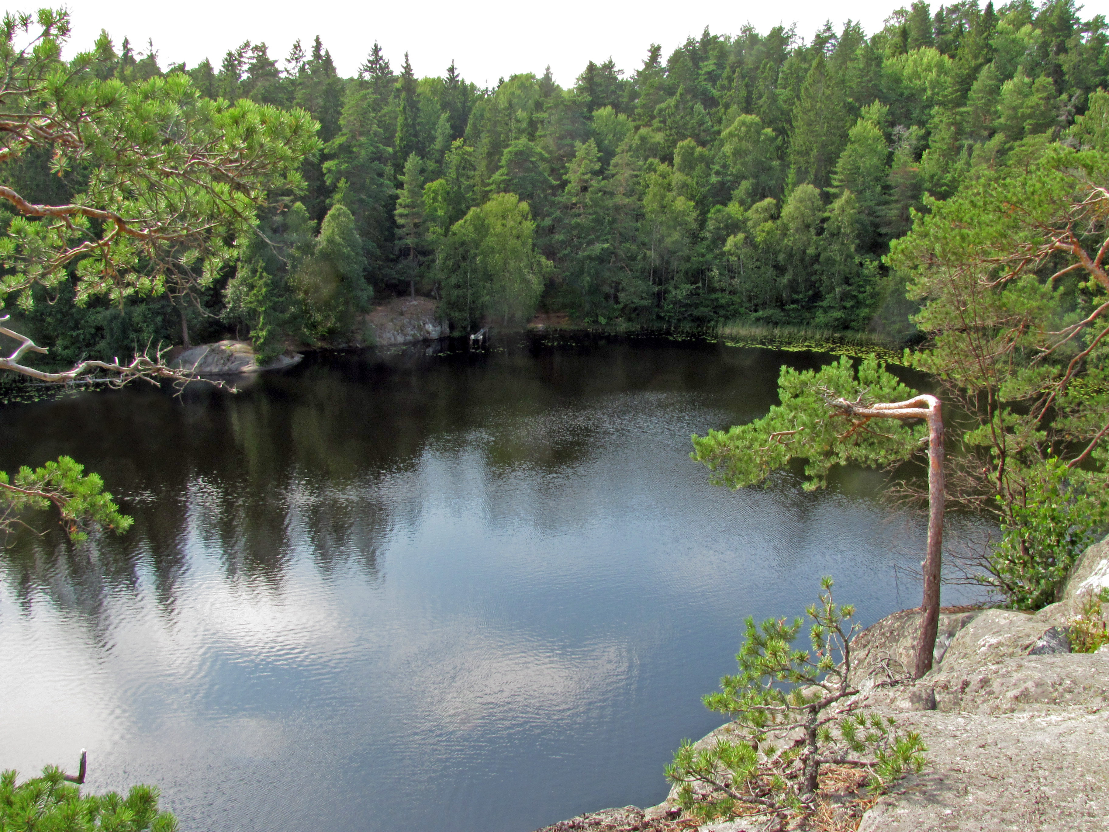 Abborrträsk, Nacka